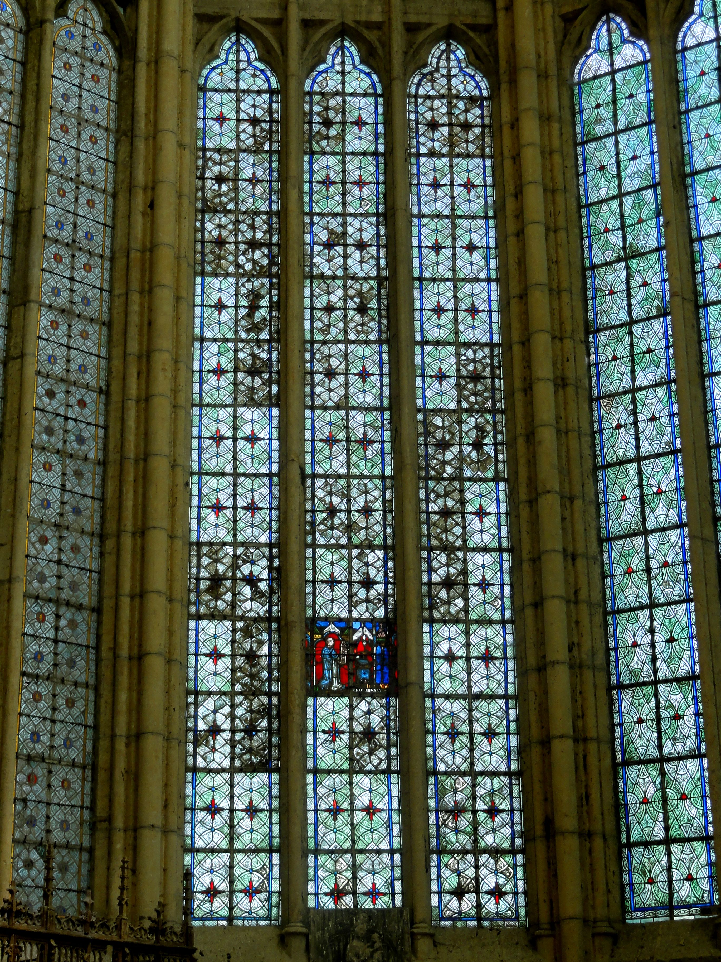 Vitrail inférieur de la baie n° 1.